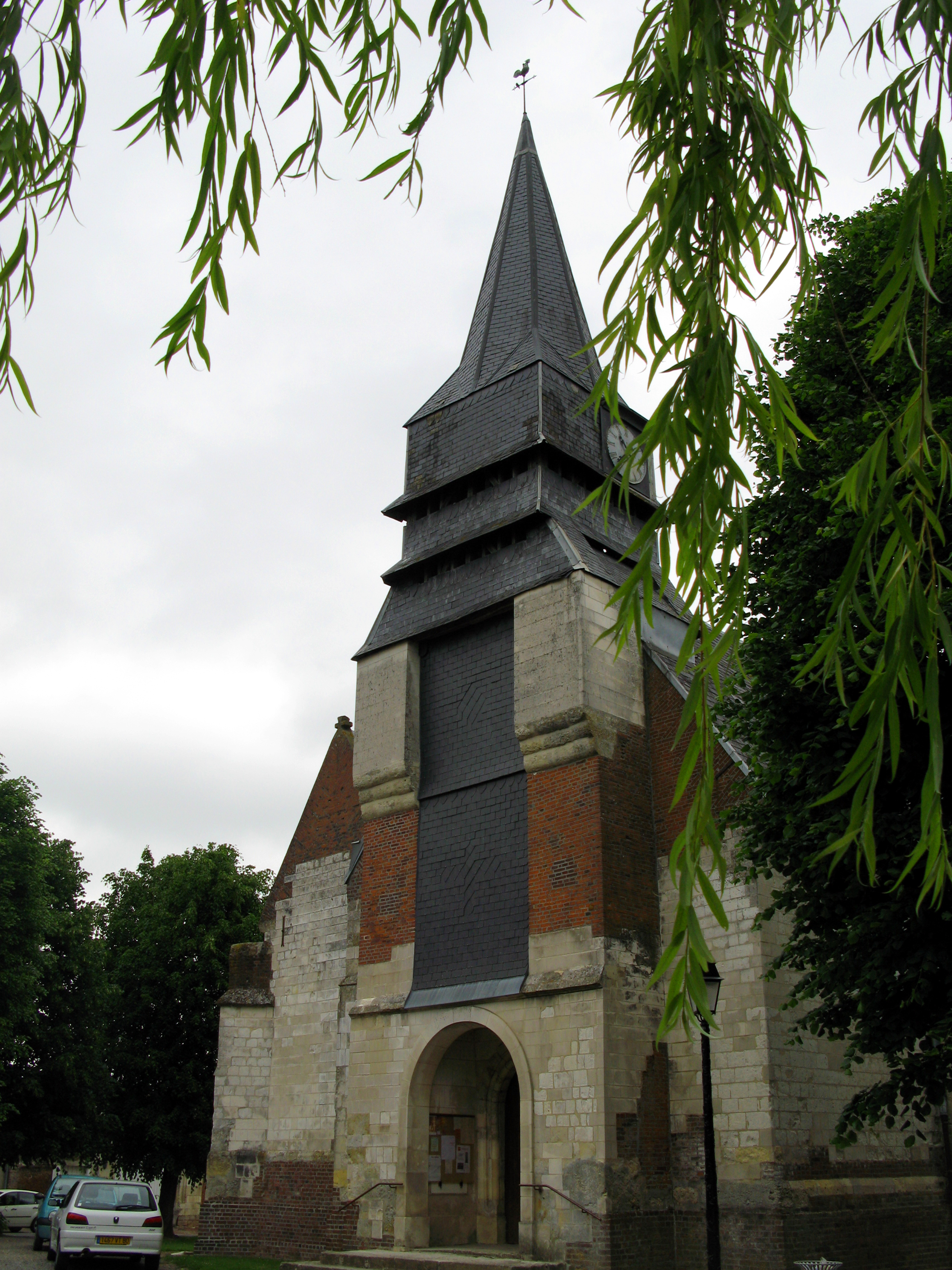 Sains-en-Amiénois (Somme, France) - Eglise. On remarque : la position de l'horloge, non centrée sur le côté du clocher. le léger surplomb des pierres supérieures de la face du clocher.